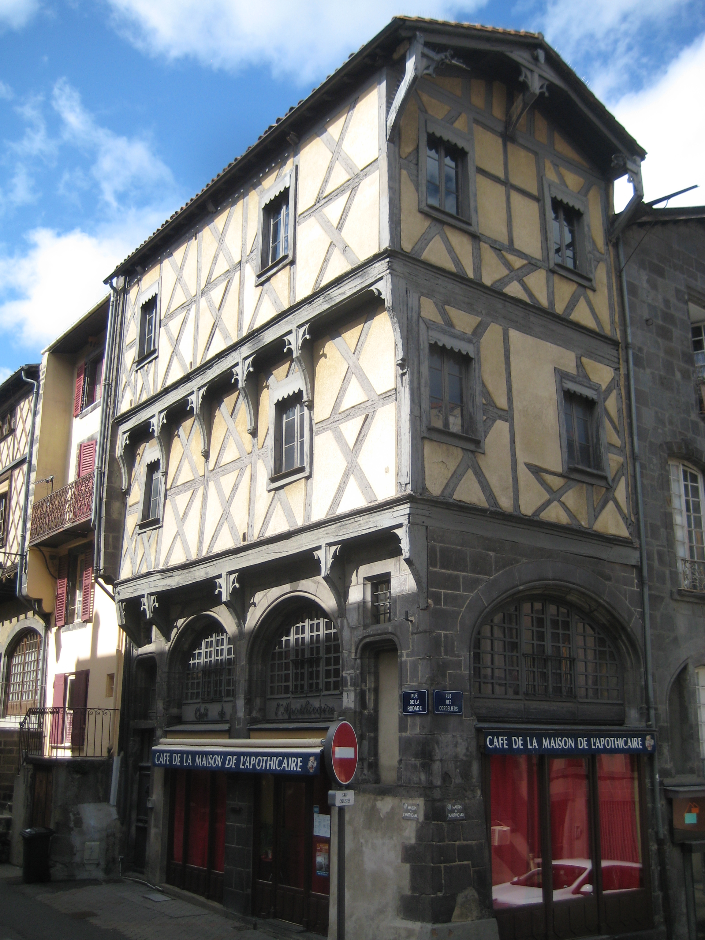 Maison de l'Apothicaire, 2 rue de la rodade, Clermont-ferrand .